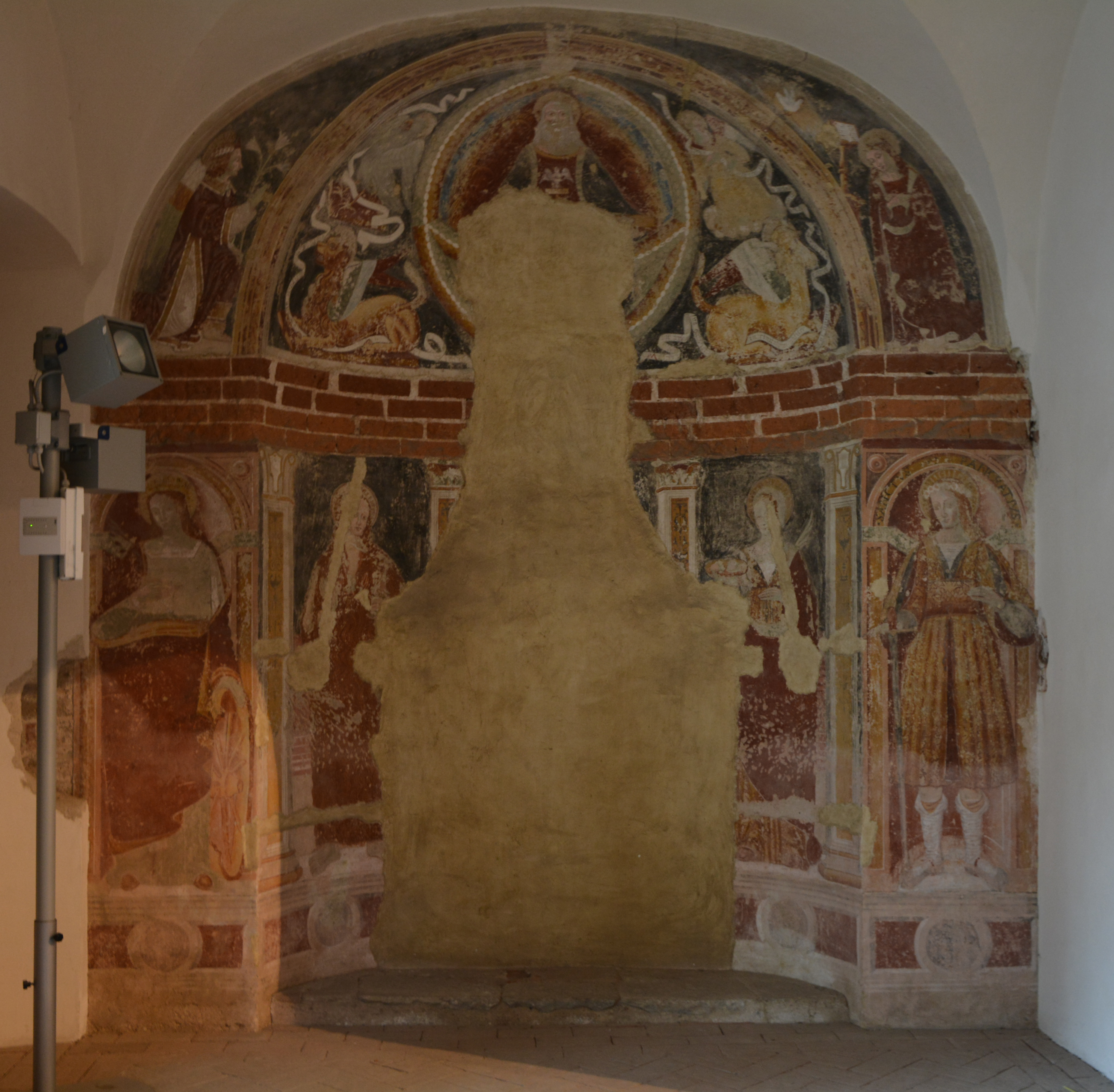 L'affresco raffigurante Dio Padre tra gli Evangelisti nel monastero di Cairate, in provincia di Varese.